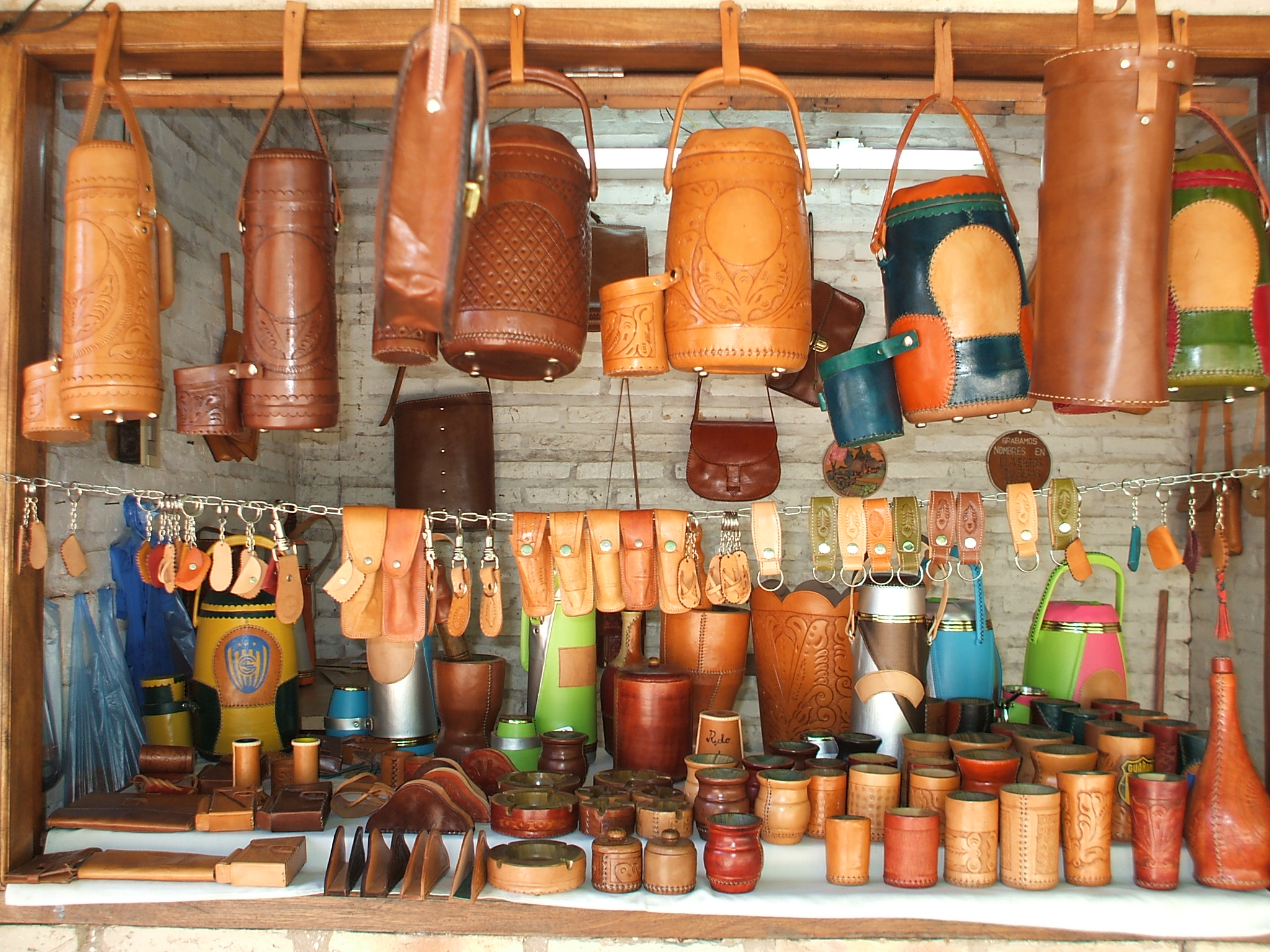 Artesania